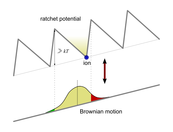 ノコギリ状の非等方的な構造を持つポテンシャル （ラチェット・ポテンシャル） が与えられていると仮定する。 このポテンシャルの障壁を乗り越えられないレベルのエネルギーを持つ粒子は、片方の方向に偏った位置 （例えば右） にある極小点のまわりに捉えられる。 このノコギリ状のポテンシャルを外部から取り除くと、爪が外された歯車のように粒子はその回りで自由に等方性のブラウン運動を行なえるようになる。 再びポテンシャルをかけると粒子は再びどこかの極小点に捉えられるが、極小点の位置が右に偏っているため、それが移動するときには左よりも右に移動する確率が高くなる。 この過程を繰り返せば正味の運動として粒子の右向きの運動を取り出すことができる。Astumian, R. Dean (1997). "Thermodynamics and Kinetics of a Brownian Motor". Science 276: 917–922.